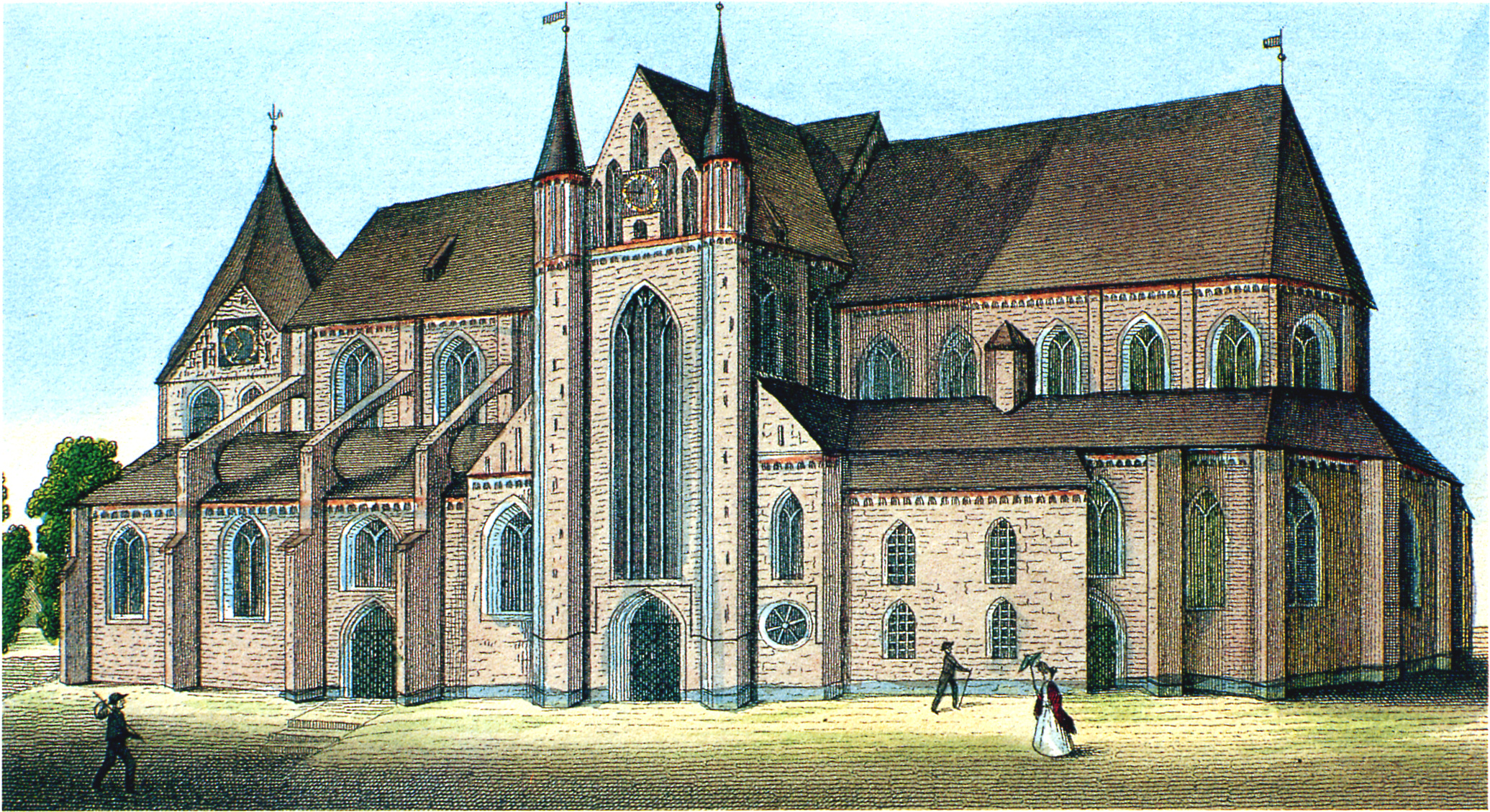 Der Dom Schwerin